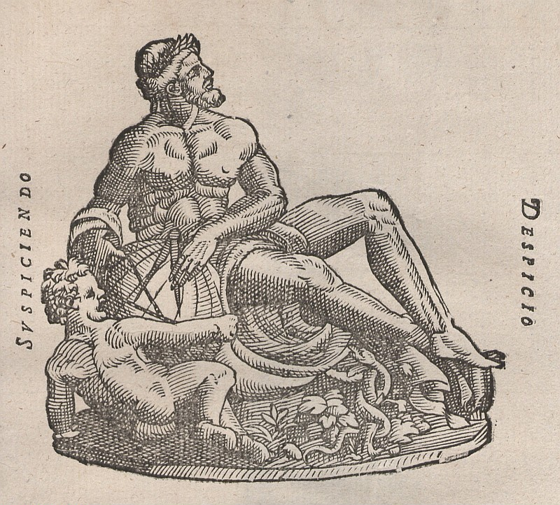 Original image description from the Deutsche Fotothek Astronomie & Forschung